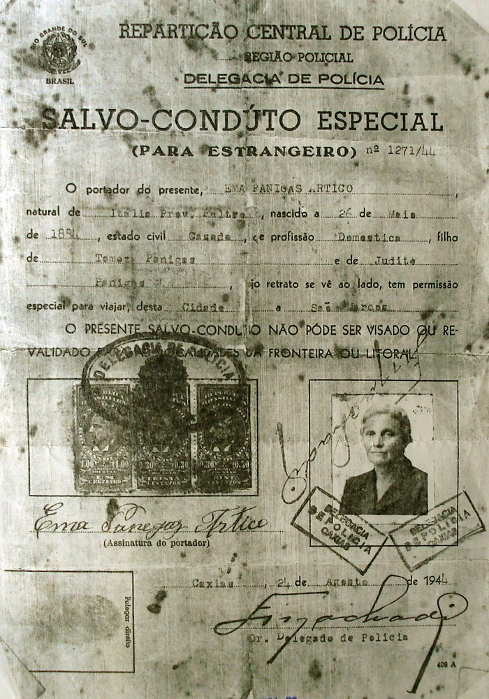 Salvo-conduto para Ema Panigaz Artico